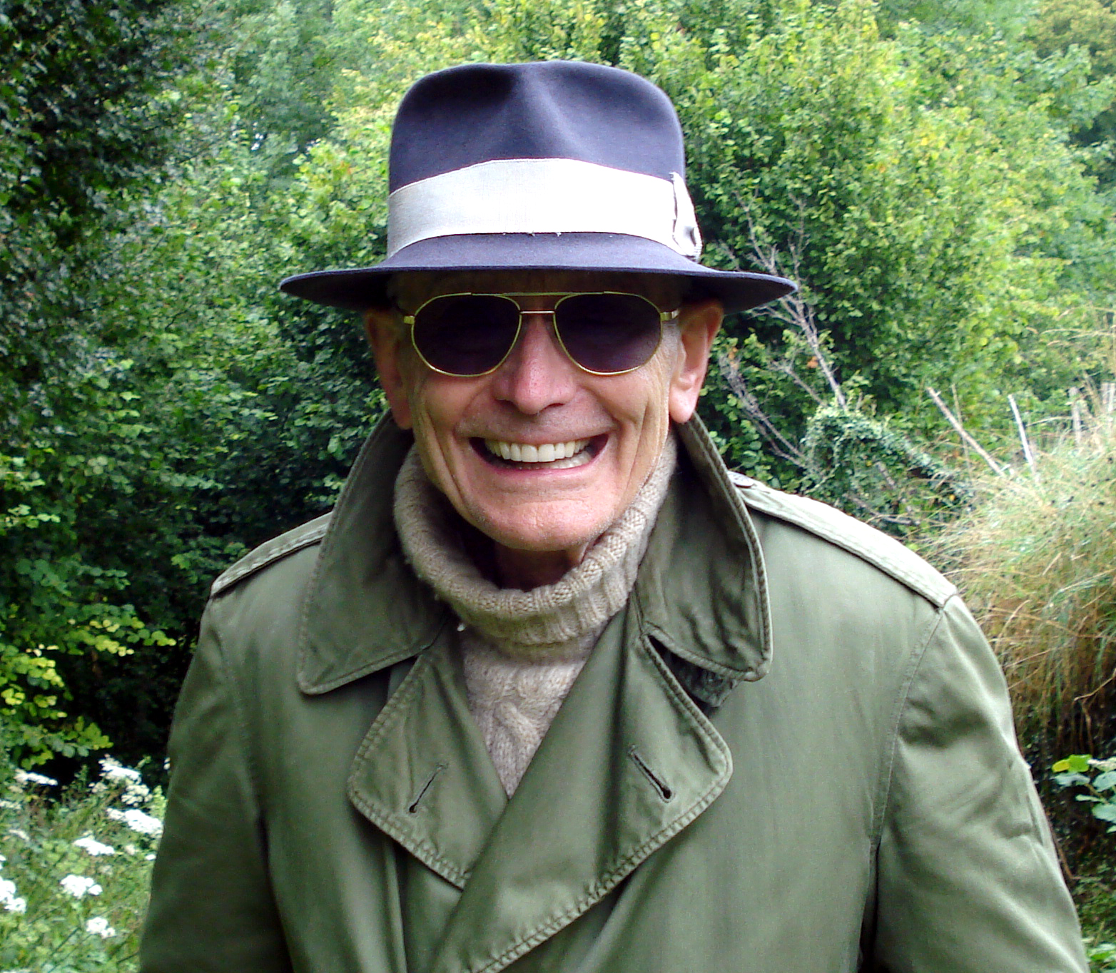 Jacques Monory à Chateau-Chalon